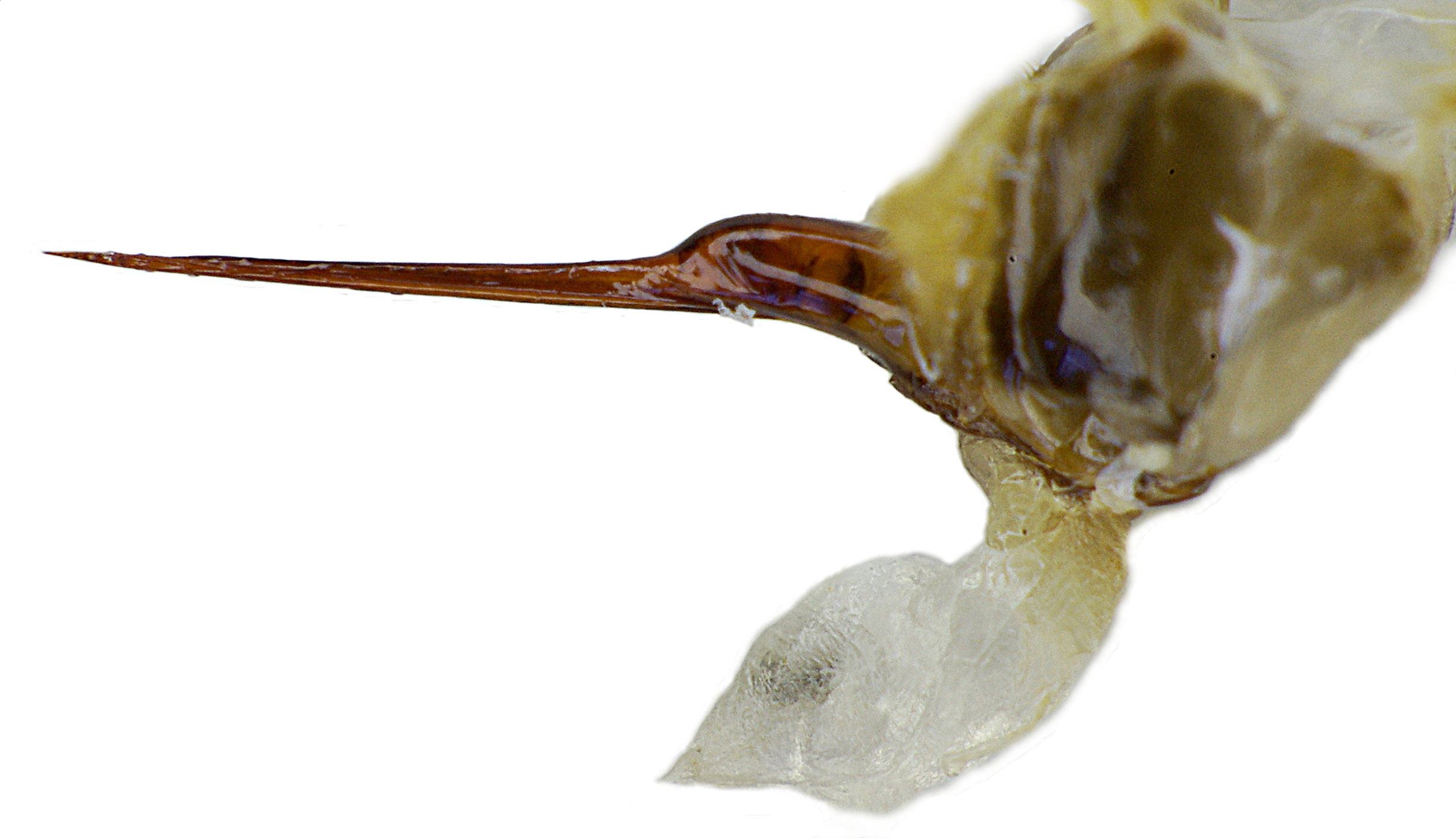 Stachel von Apis mellifera